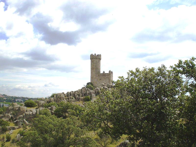 Torre vigía de Torrelodones